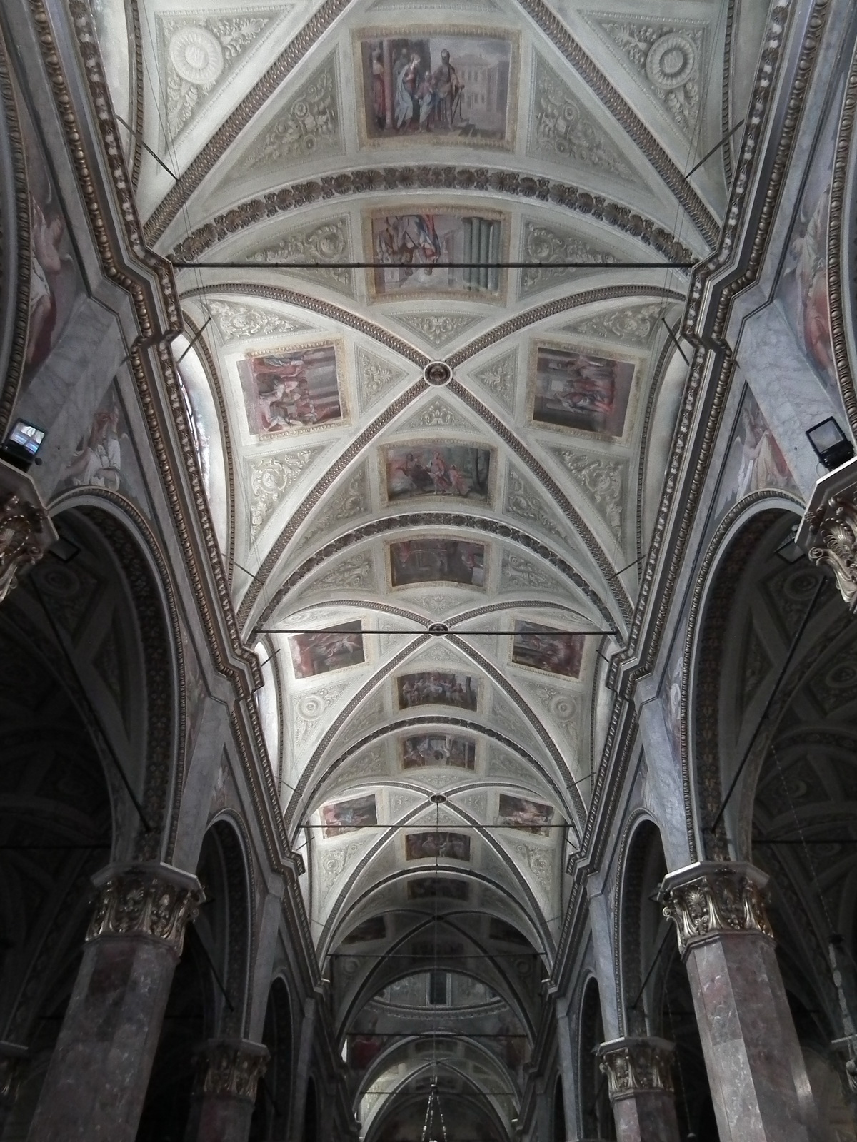 Santuario di Nostra Signora della Misericordia, Savona, Italy